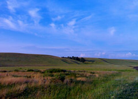 Ишимские бугры — Афонькинский, Казанский район This image is related to the protected area of Russia number 7210072